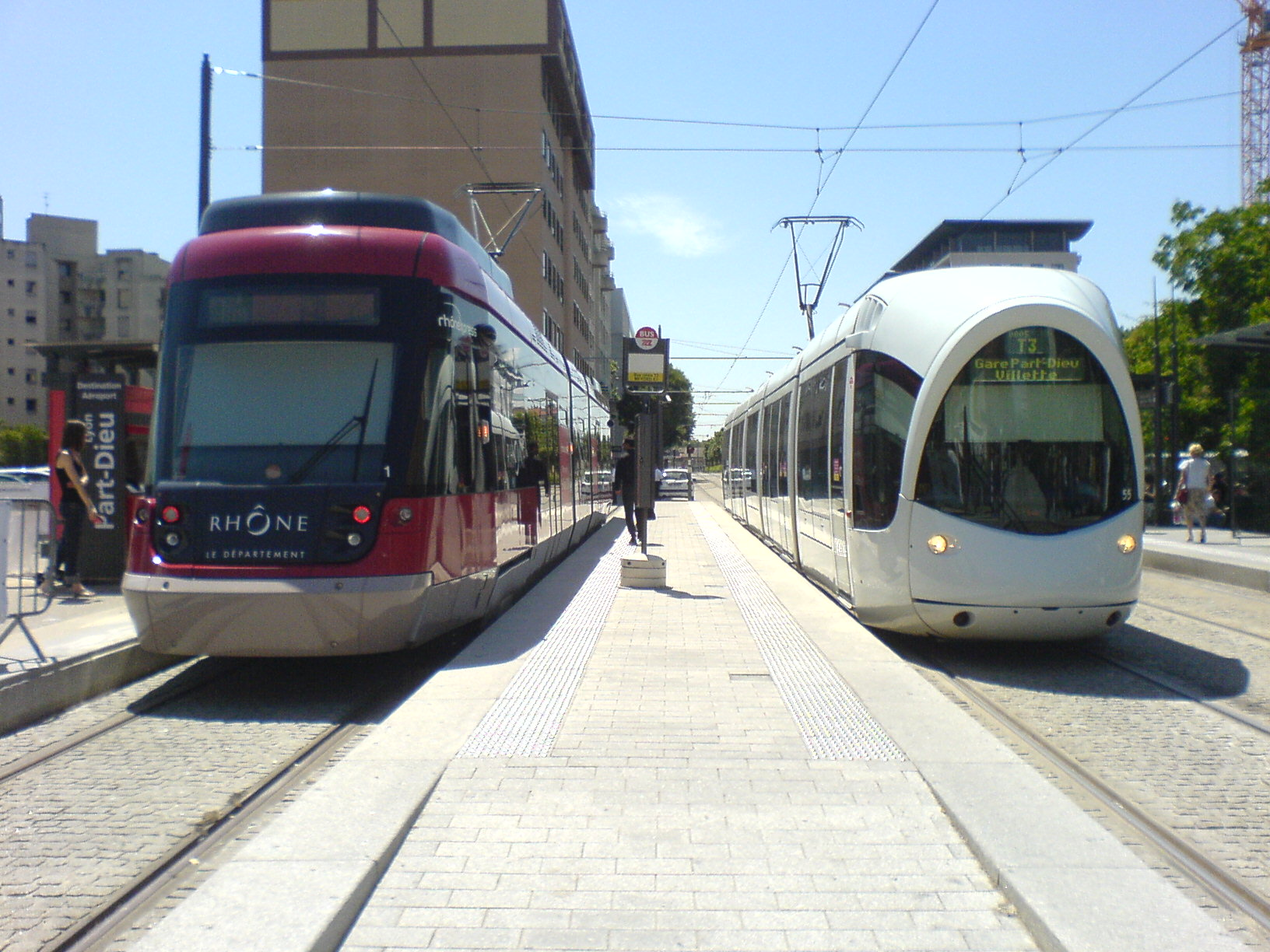 Rhonexpress a la station Part dieu (T3) Lyon fr